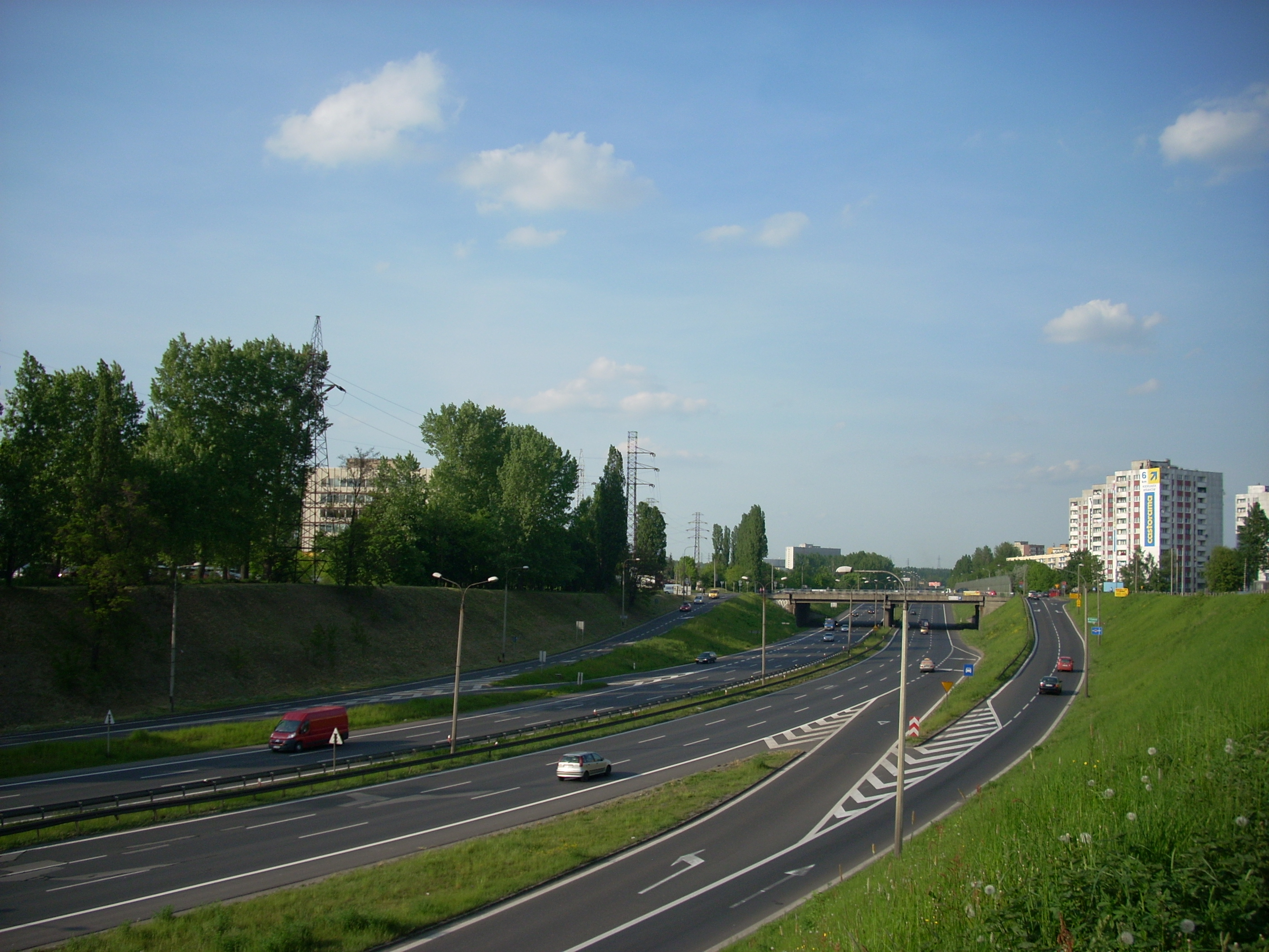 droga_ekspresowa_S86